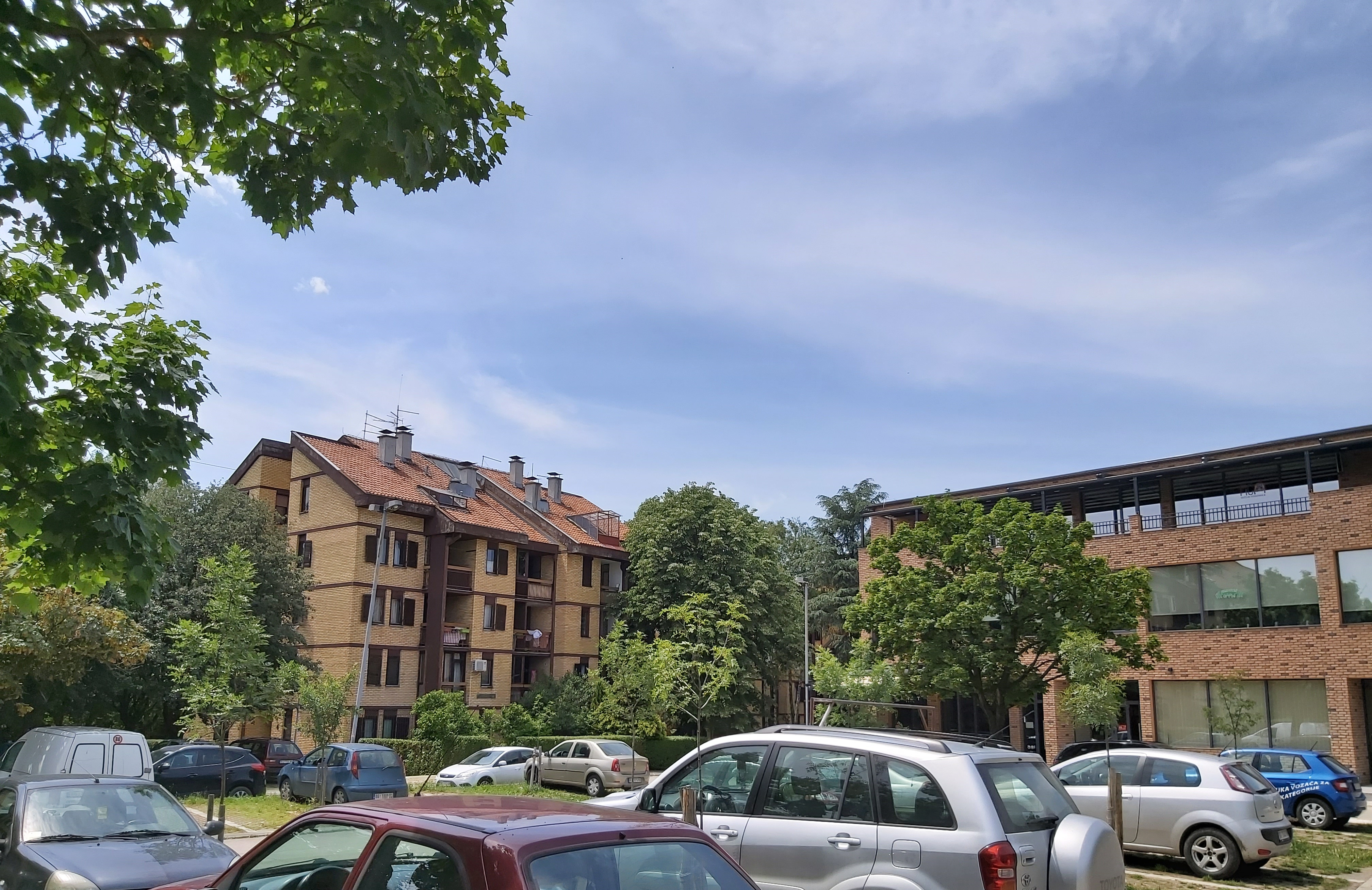 Насеље Авала град у Реснику